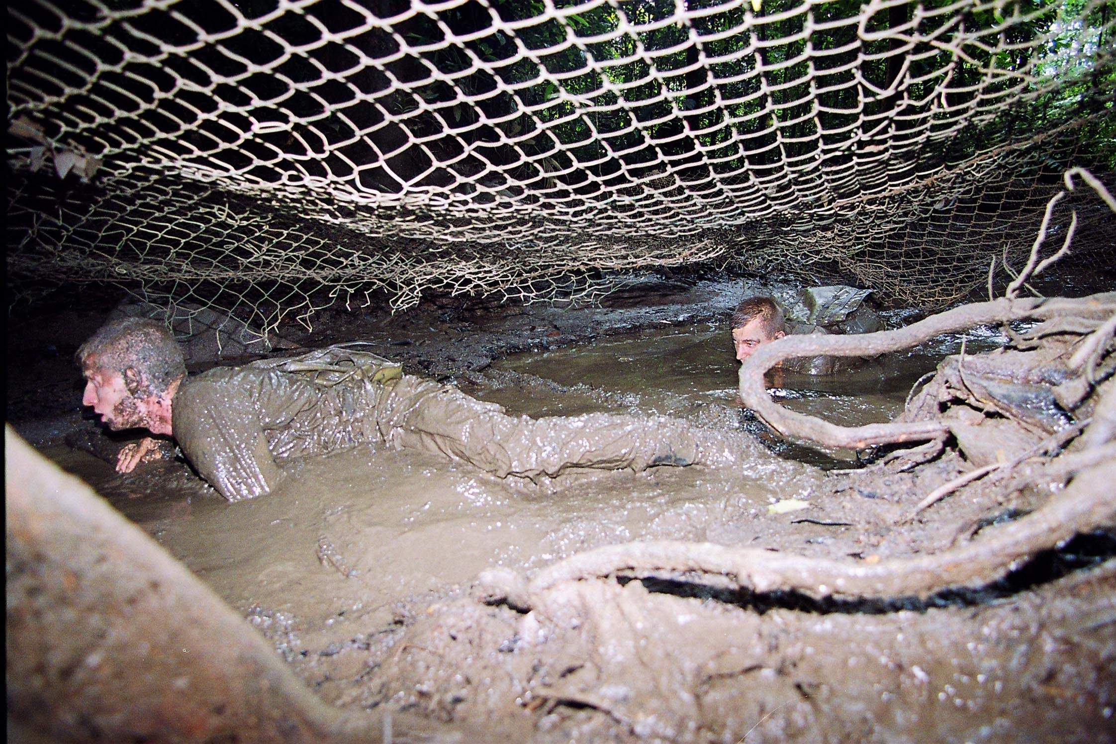 Piste au Centre d'entraînement en forêt équatoriale du 3e Régiment étranger d'infanterie (Guyane - France)